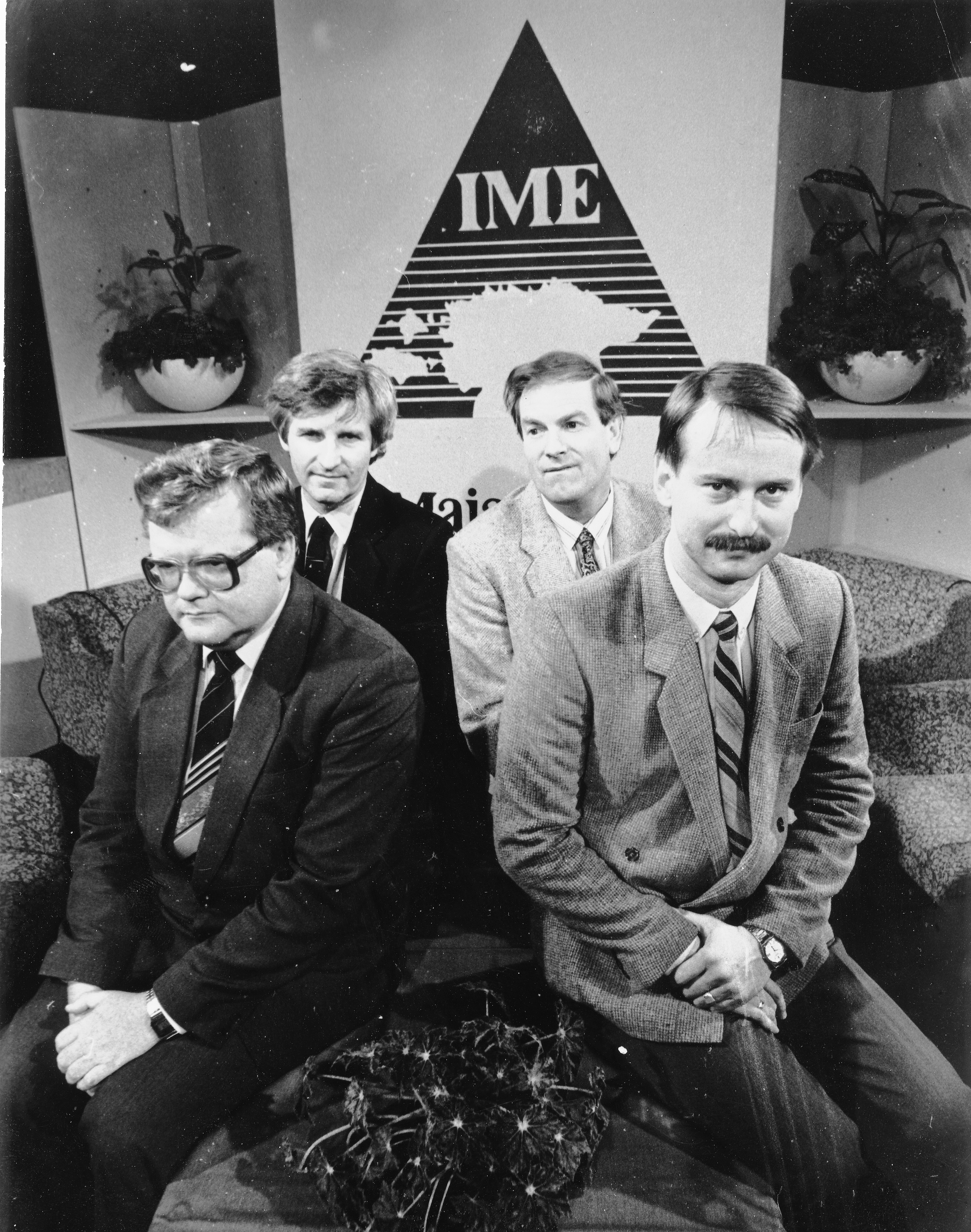 Edgar Savisaar, Mikk Titma, Tiit Made ja Siim Kallas ETV saates. Harald Leppikson pildistas nelja ettepaneku tegijat ETV saates Rahva Hääle ülesandel.